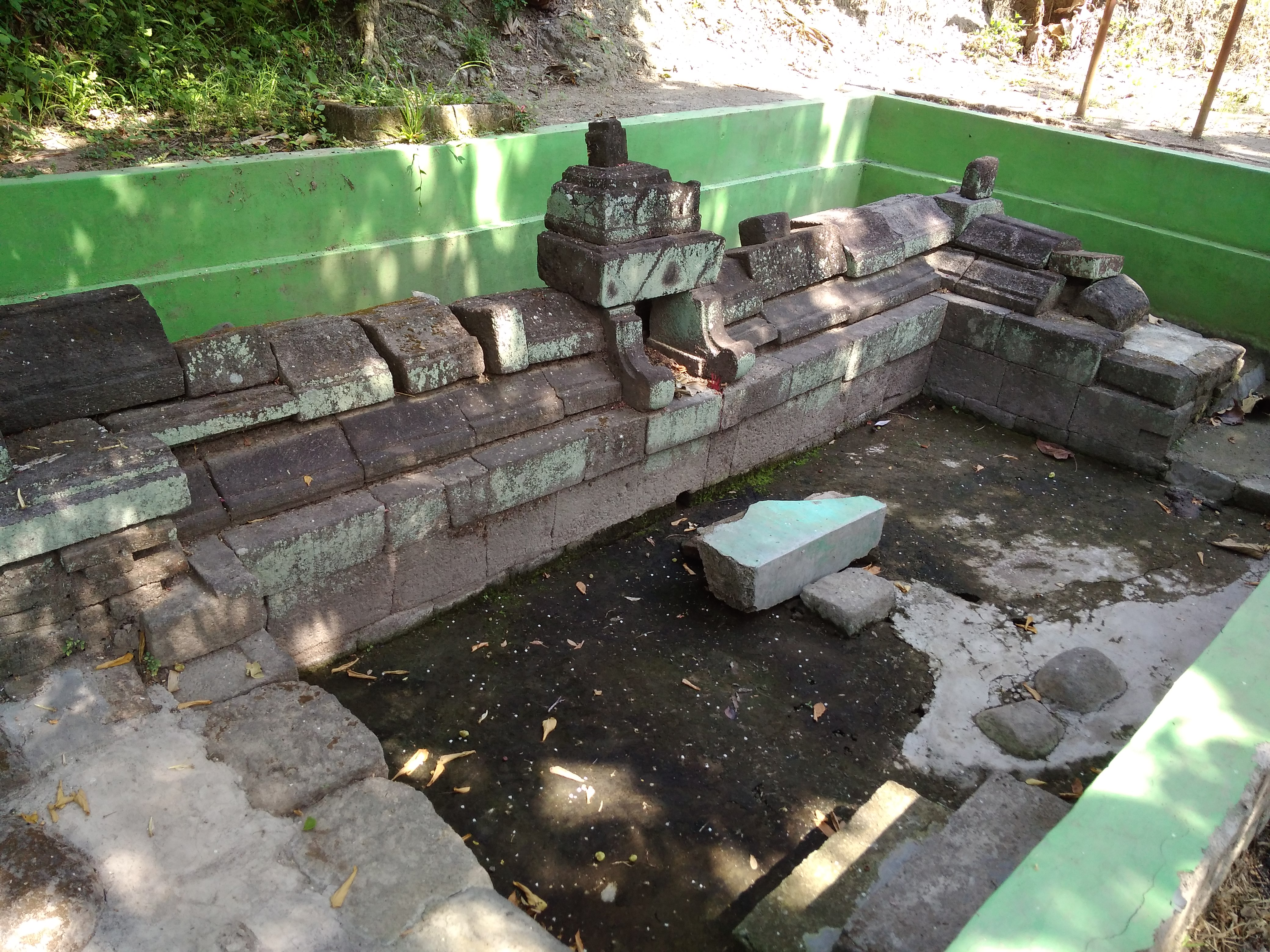 Situs Petirtaan Kunden